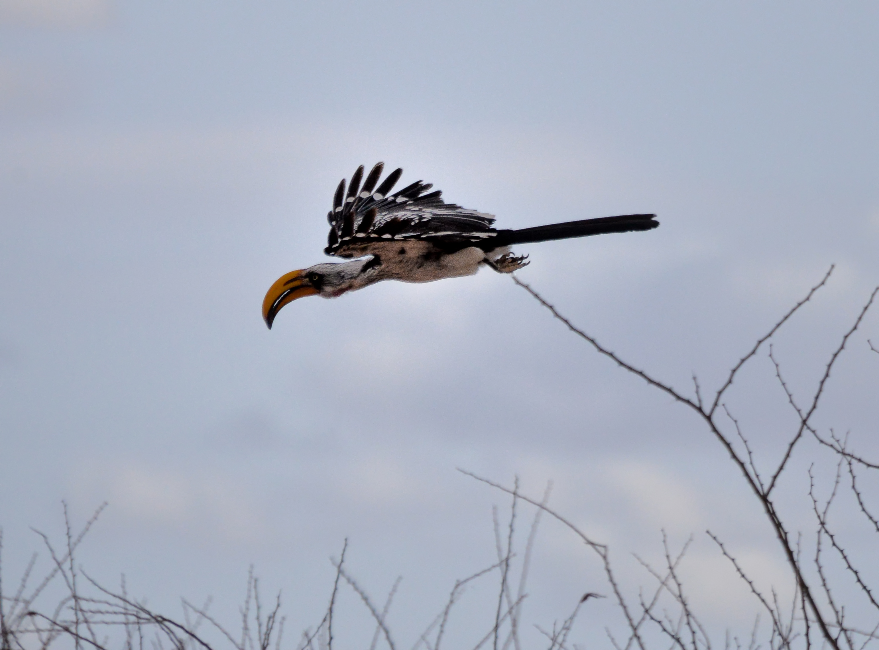 Tockus flavirostrus, Omo Valley